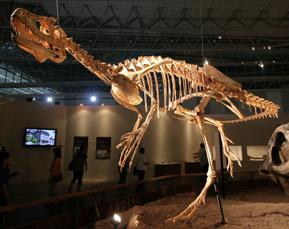 Deltadromeus - 01